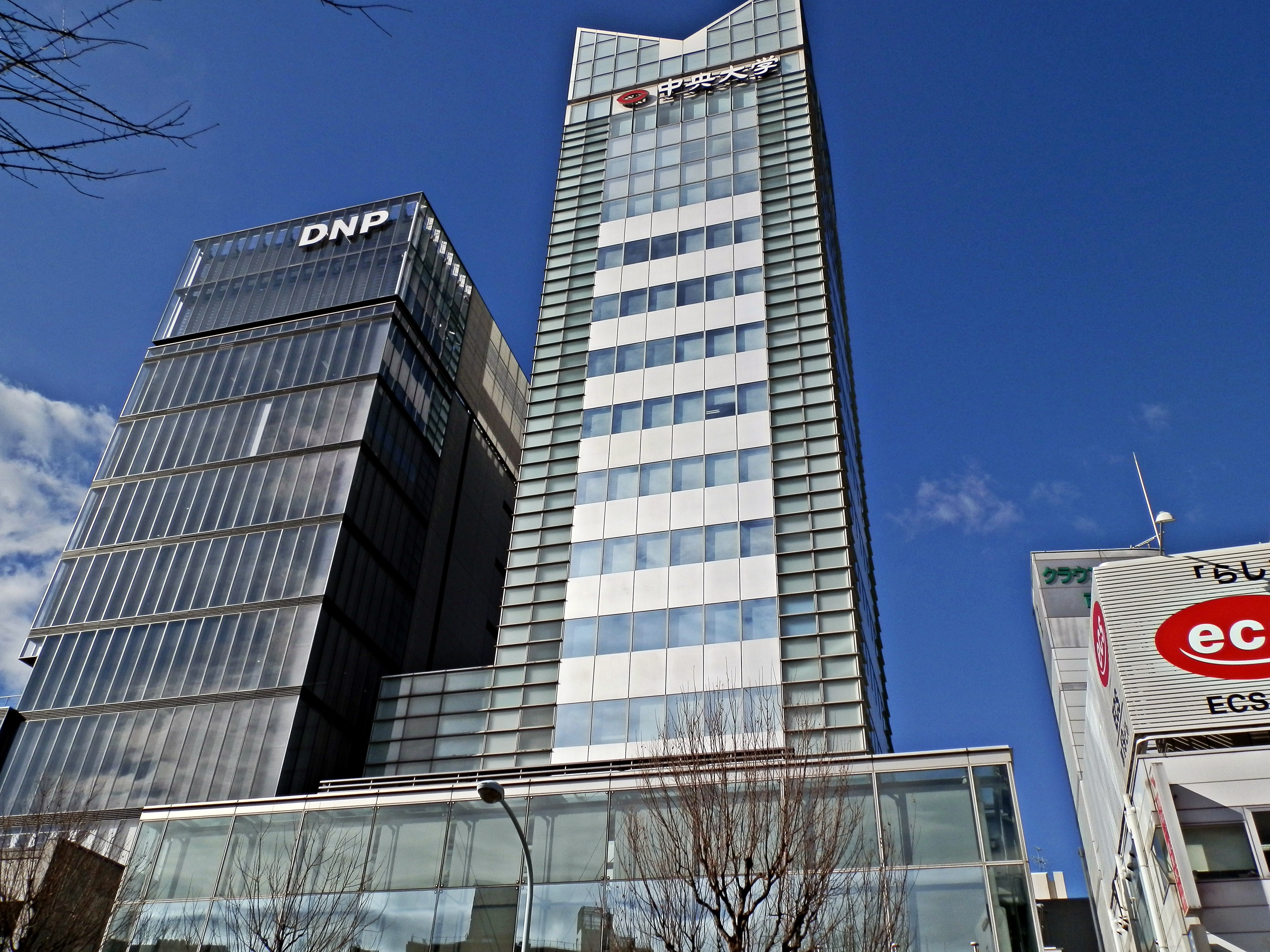 中央大学市ヶ谷田町キャンパス（中央大学ミドルブリッジ） Chuo University Ichigaya Tamachi Campus / Middle Bridge